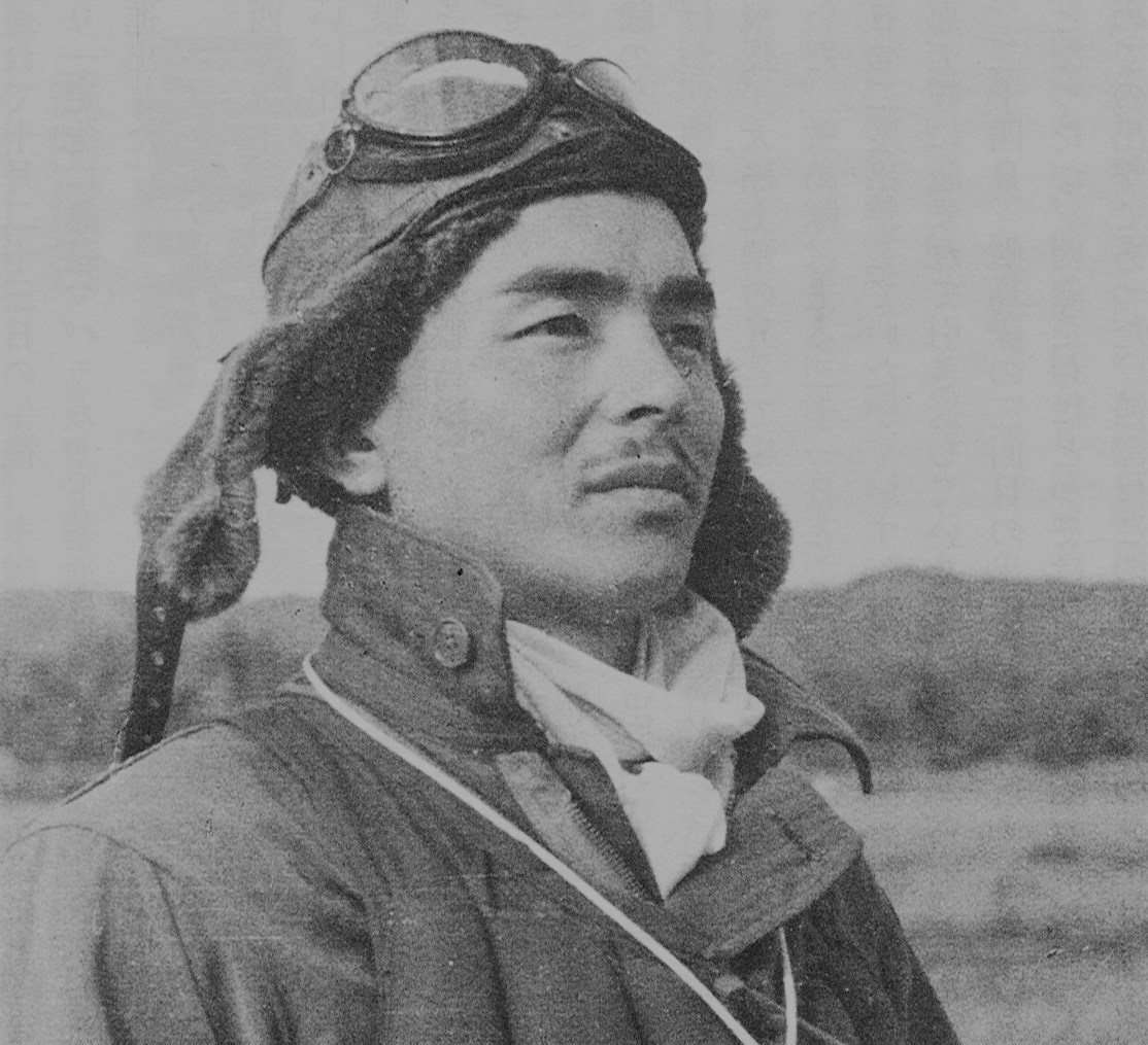 西沢広義